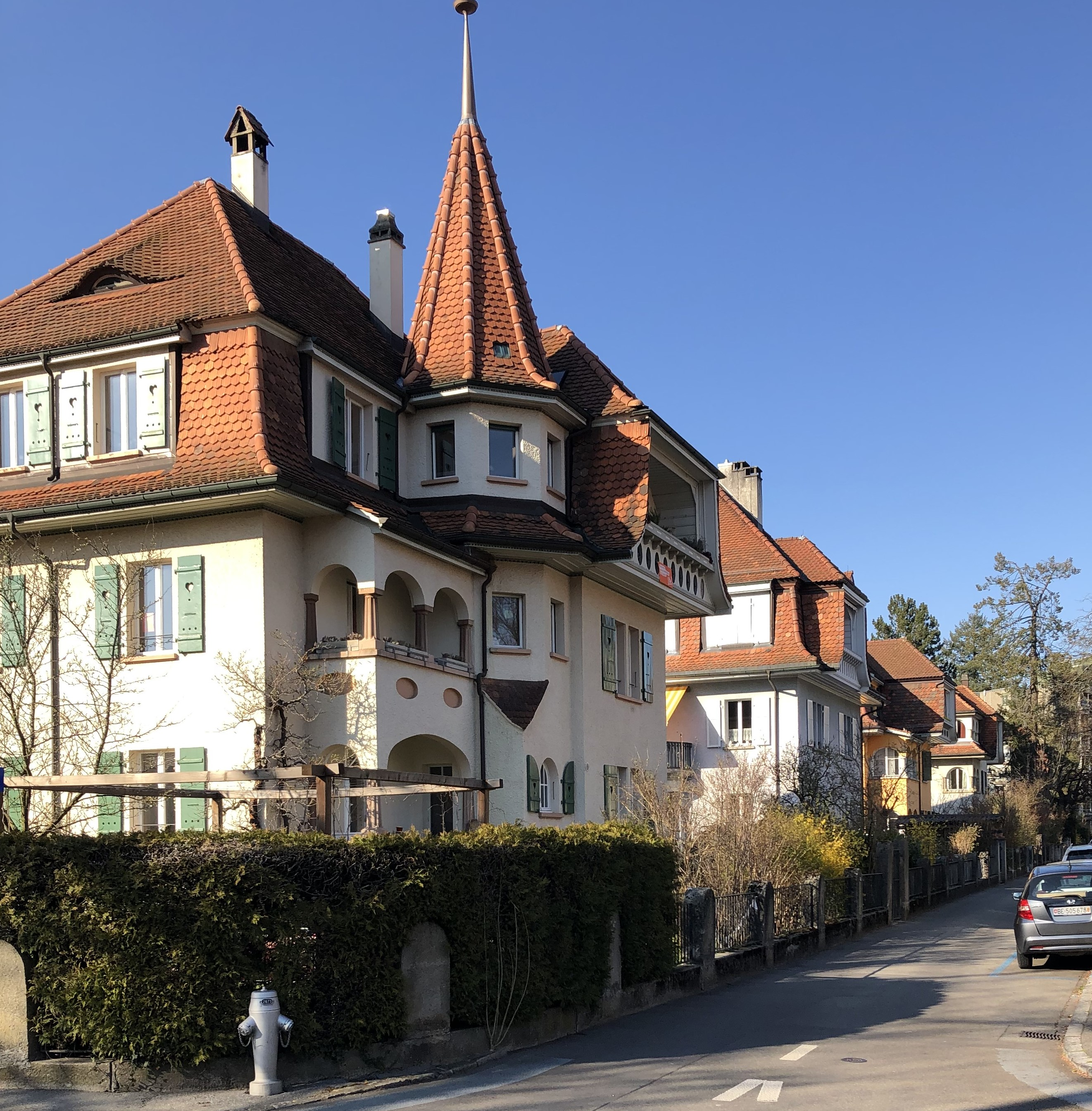 Stapfenacker Siedlung